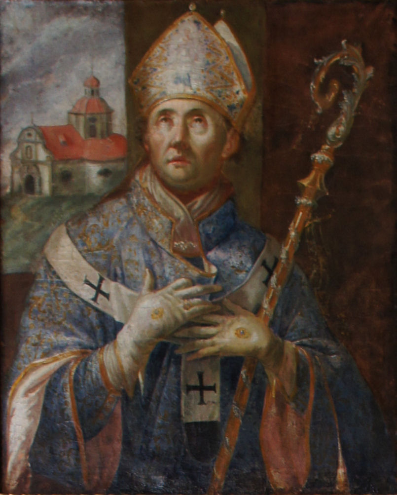 Porträtgemälde von Erchanbert, Bischof von Freising, im Fürstengang zwischen Fürstbischöflicher Residenz und Freisinger Dom.